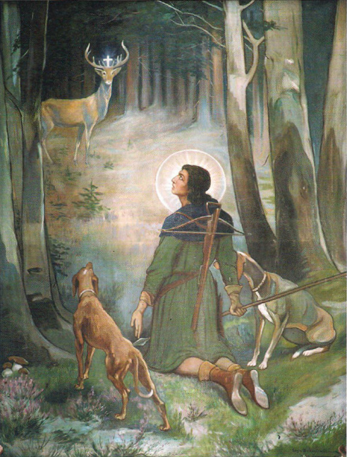 Святы Губерт; палатно, алей.